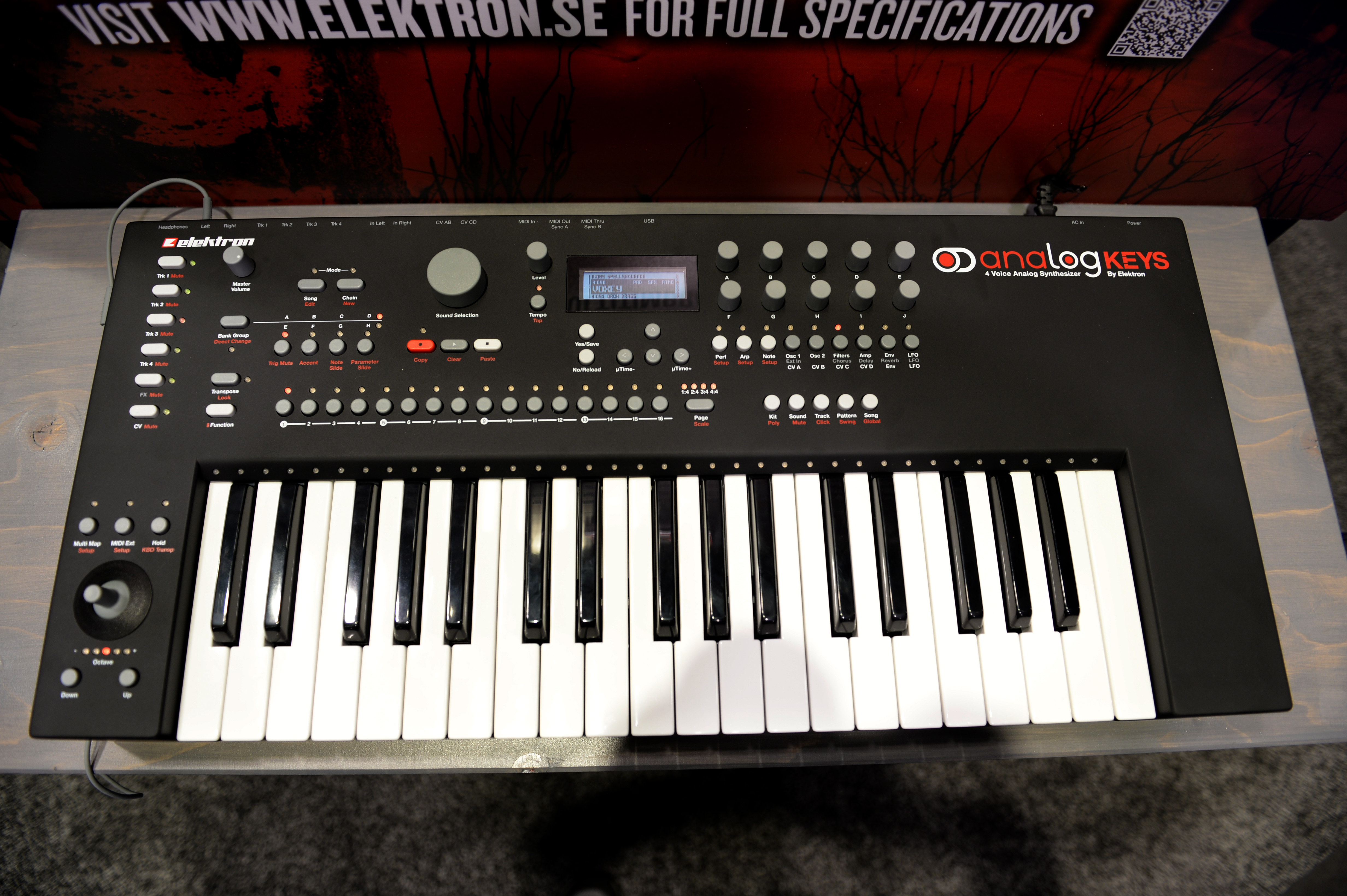 Elektron_AnalogKeys